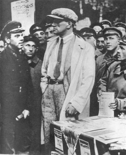 В. Маяковский на книжном базаре среди красноармейцев 1929 год